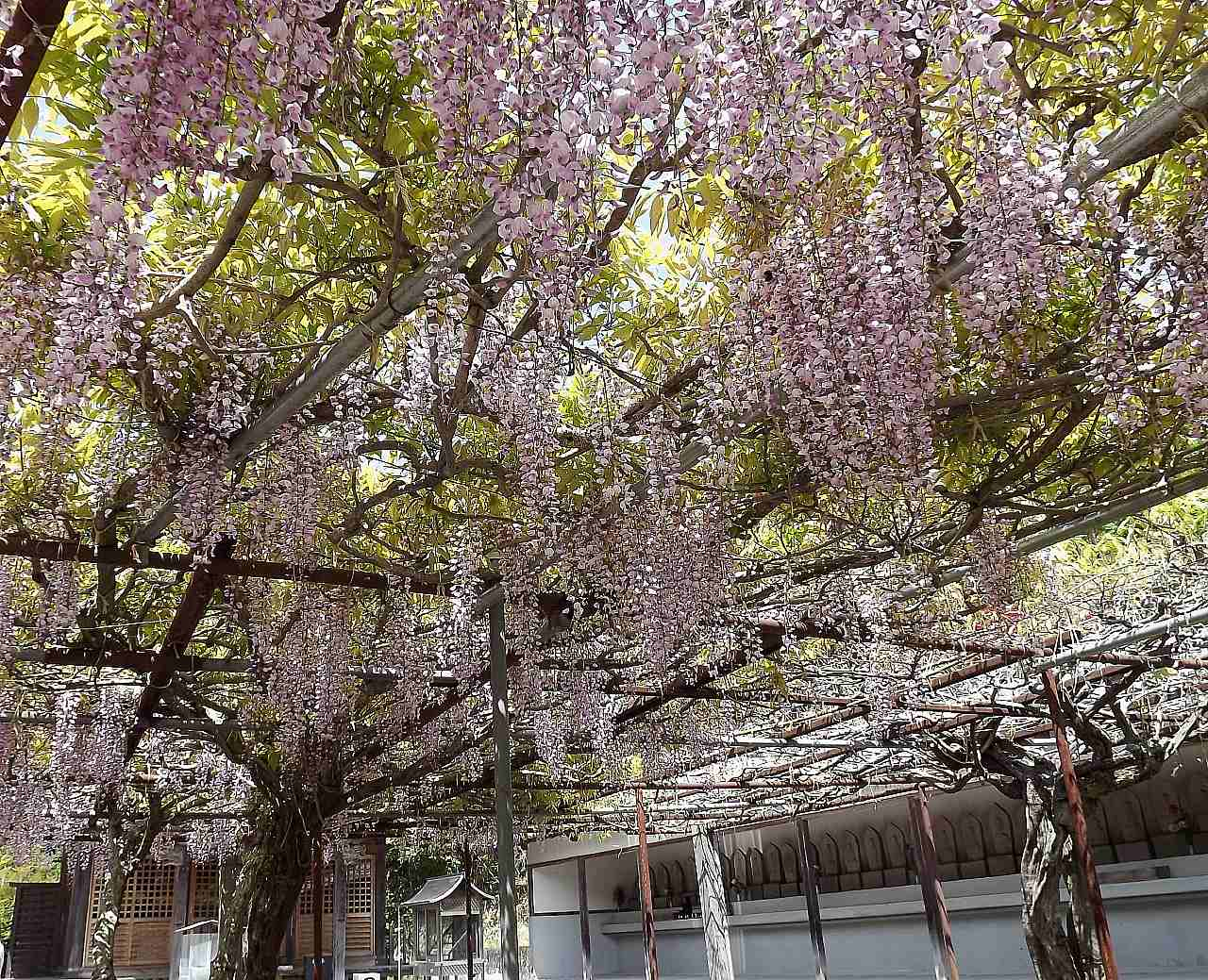 童学寺大師堂の前の藤